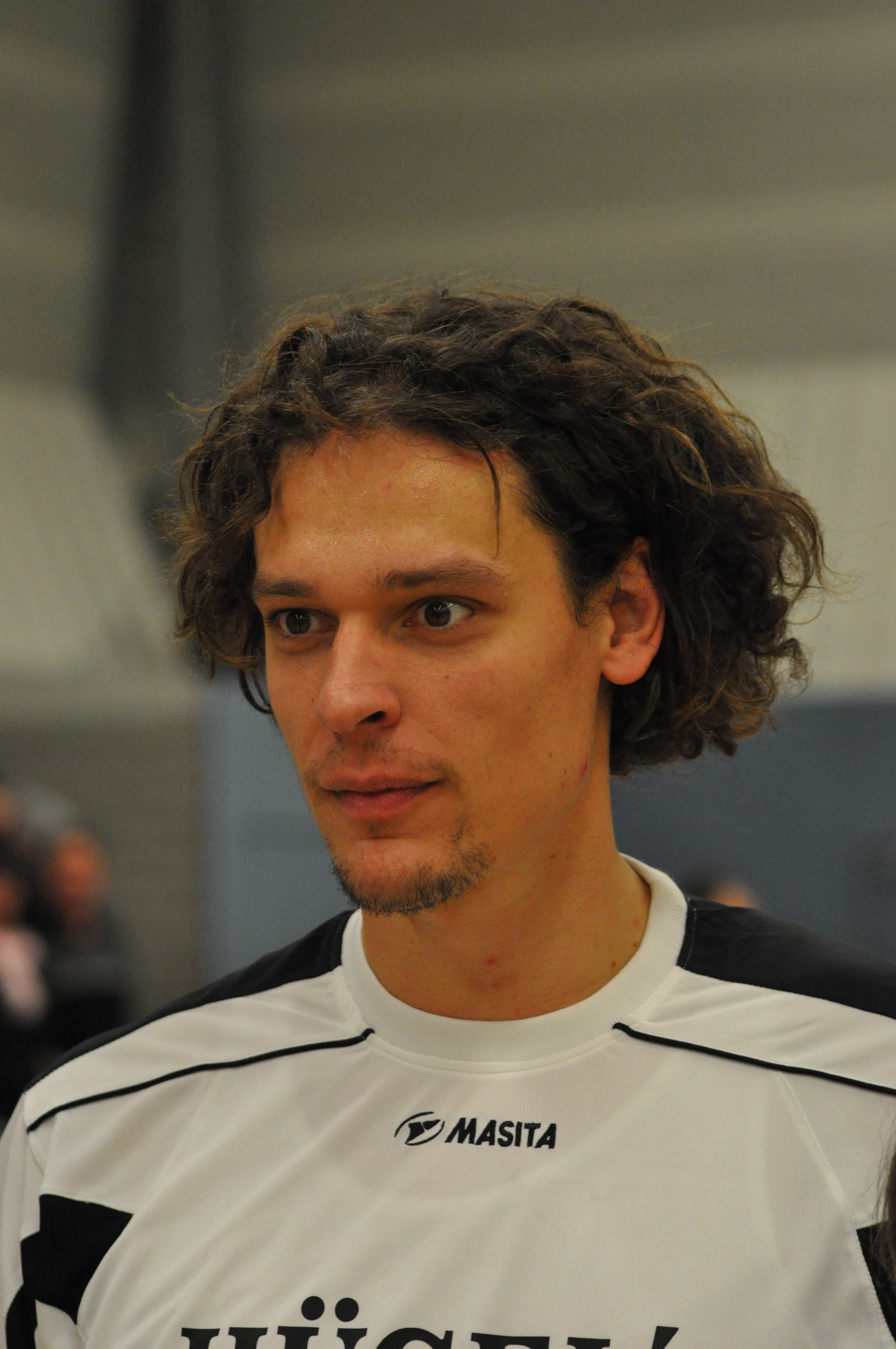 Deutsche Handballspieler am 10. Dezember 2010 in der "Sporthalle am Mühlenberg" in Ribnitz-Damgarten bei einem Spiel zu Ehren des 70. Geburtstages des ehemaligen Physiotherapeuten der deutschen Männer-Handballnationalmannschaft Klaus Bergmeier. Hier: Frank von Behren